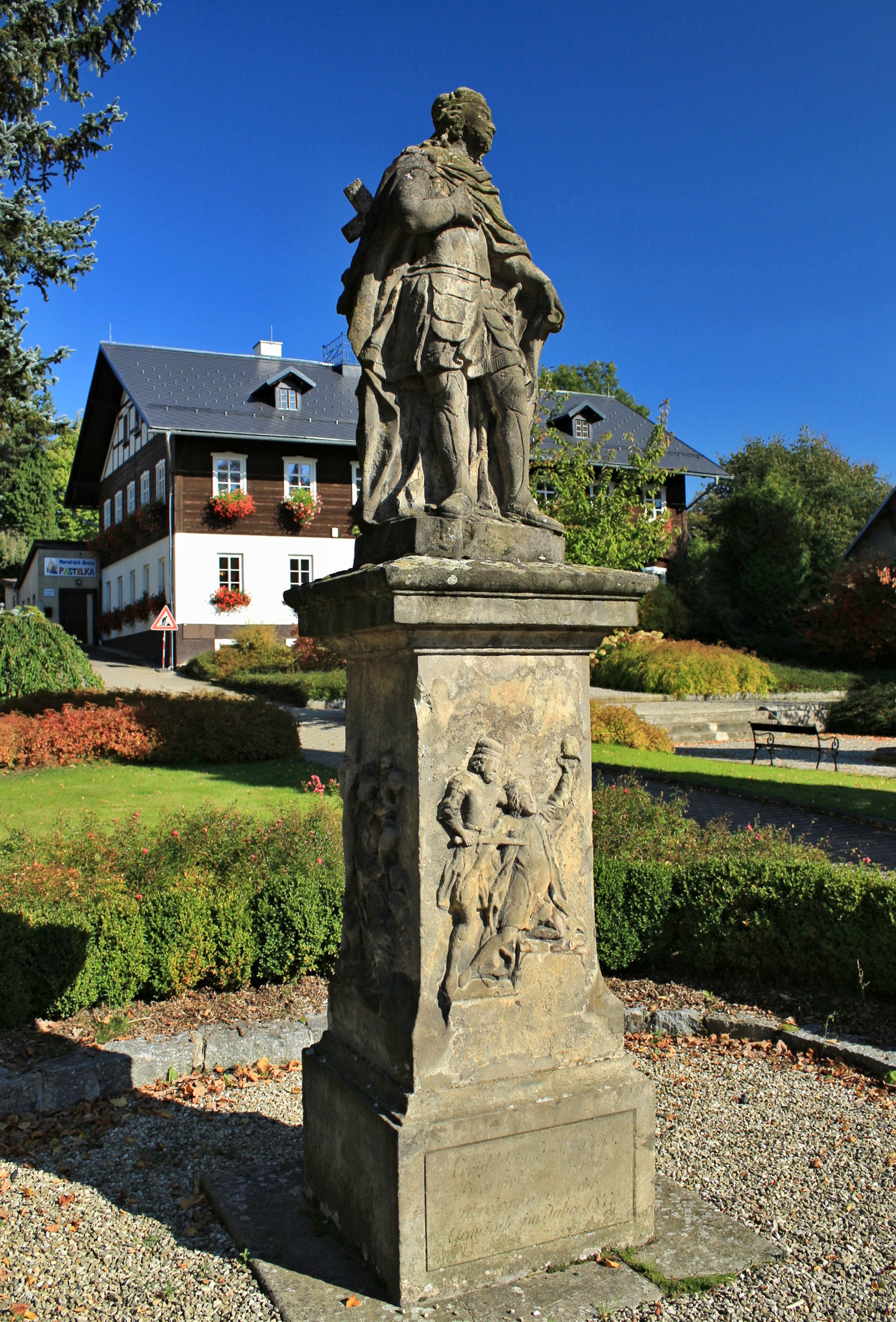 Rynoltice